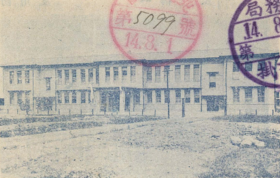 臺灣總督府水產習所，為現今海洋大學海洋環境資訊系系館